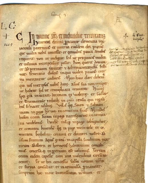 Charte de Henry II au chanoine de Saint Adalbert. 1005, Archives de la ville d'Aix-la-Chapelle